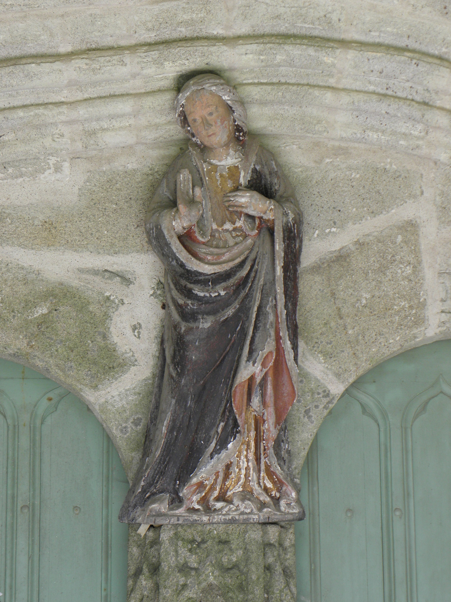 Chapelle Sainte-Noyale sise en Noyal-Pontivy (56). Statue de Sainte-Noyale à l'intérieur du porche méridional.